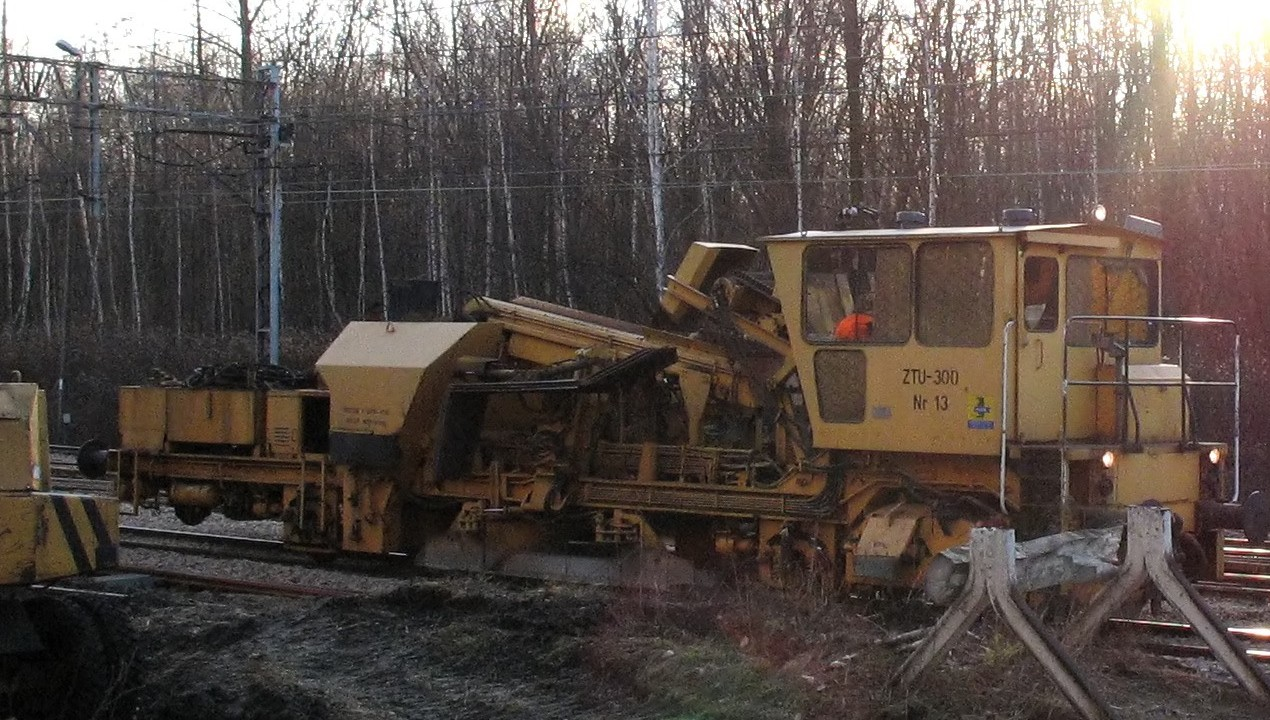 Zgarniarka tłucznia ZT-250A w malowaniu Przedsiębiorstwa Utrzymania Infrastruktury Kolejowej w Katowicach podczas remontu torowiska na szlaku kolejowym.